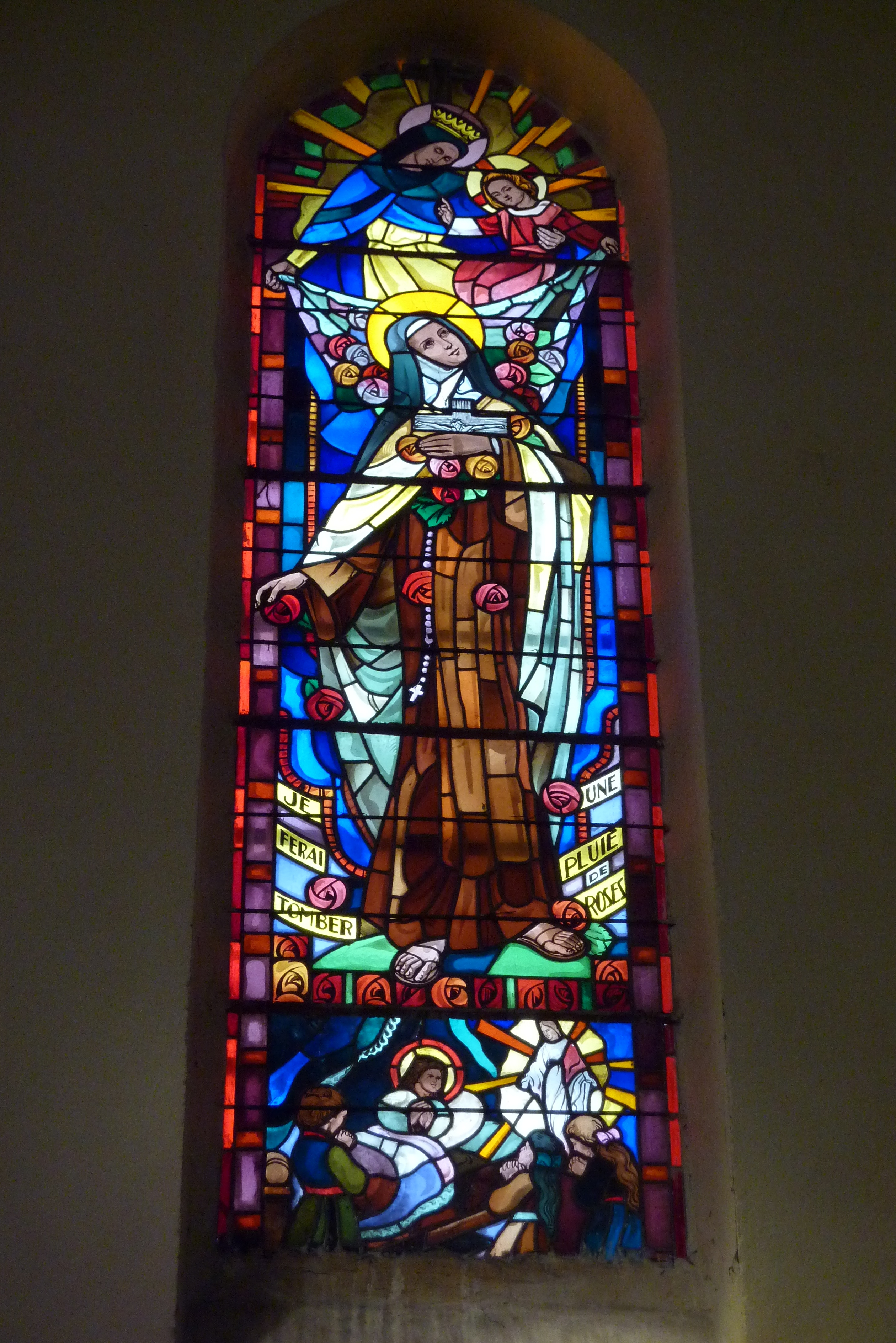 Bleiglasfesnter in der Kirche St. Sébastien in La Bégude-de-Mazenc